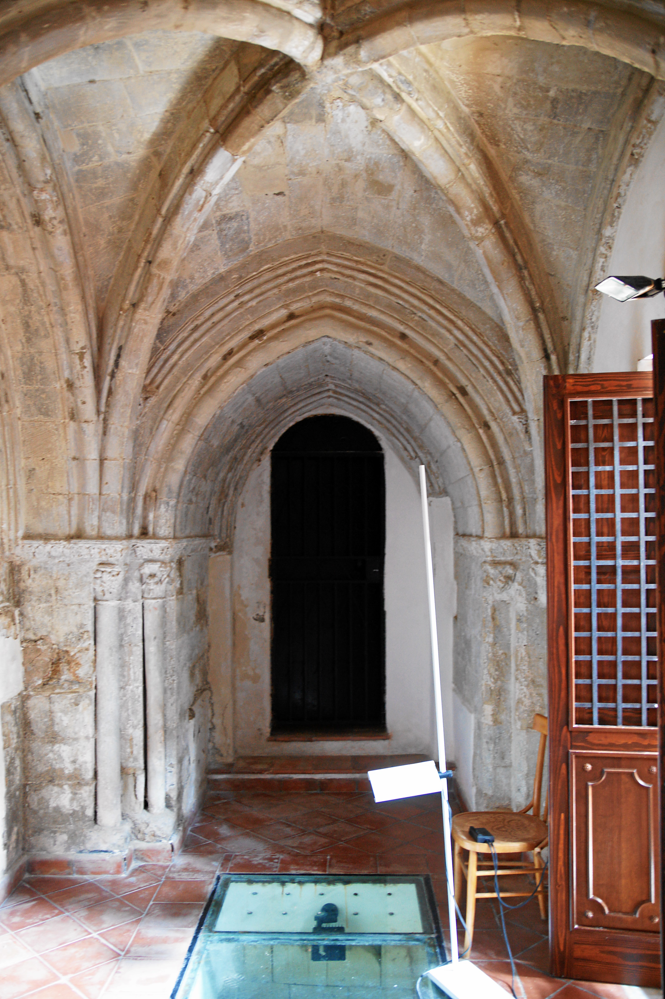 Agrigento: Chiesa di Santo Spirito - Seitenkapelle